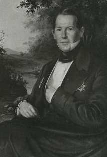 Eestimaa rüütelkonna peamees ja Liivimaa tsiviilkuberner Magnus von Essen (1796–1869)